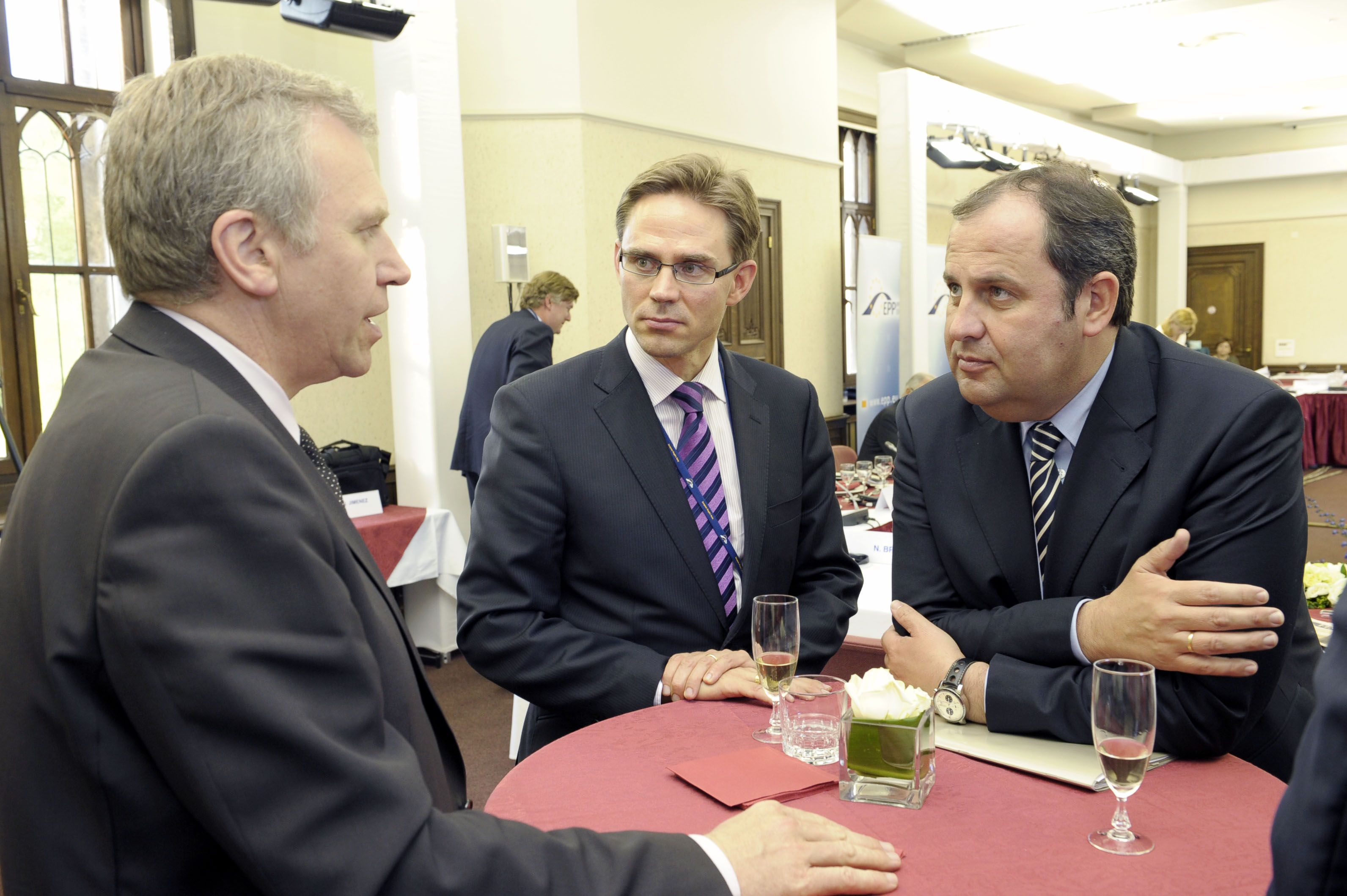 EPP Summit June 2010 (22)